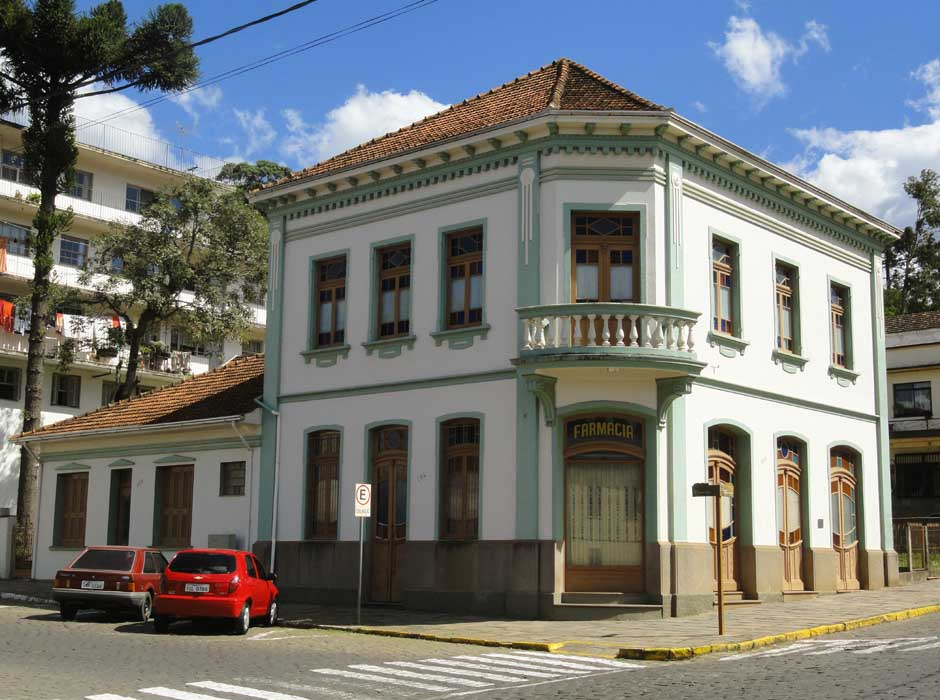 Centro Histórico de Antônio Prado - Casa e Farmácia Palombini, 1930.